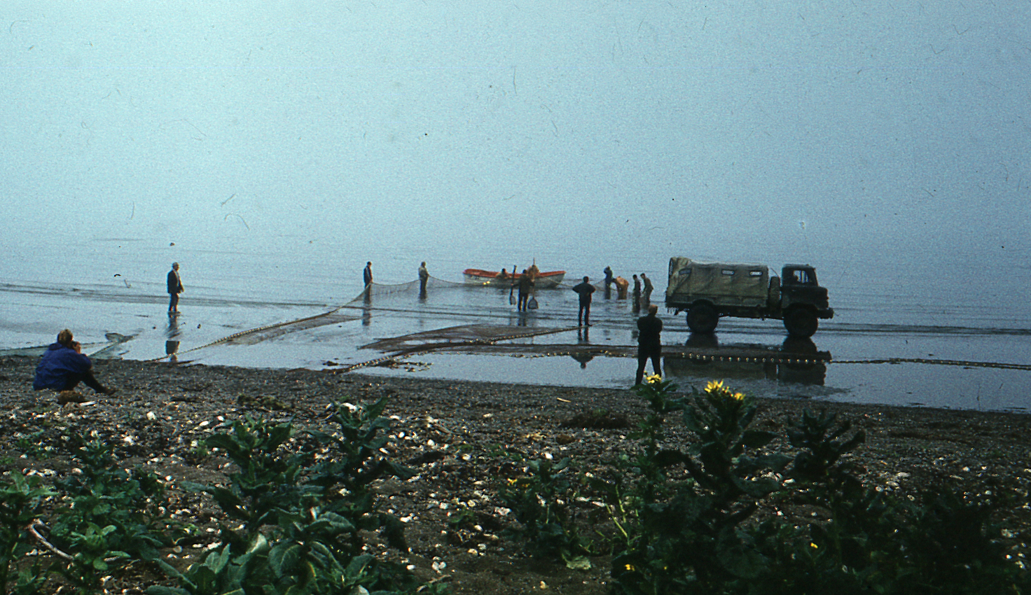 Отлив на Сахалине в заливе Мордвинова.